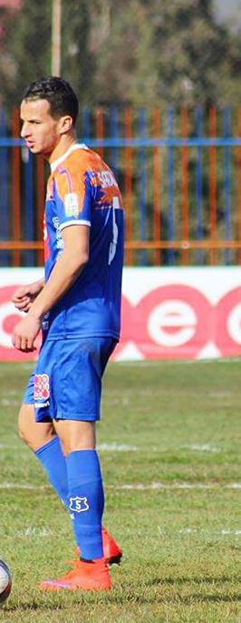 Nabil Saadou_O Médéa